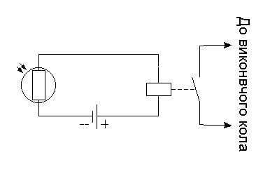 Схема найпростішого фотореле на фоторезисторі.